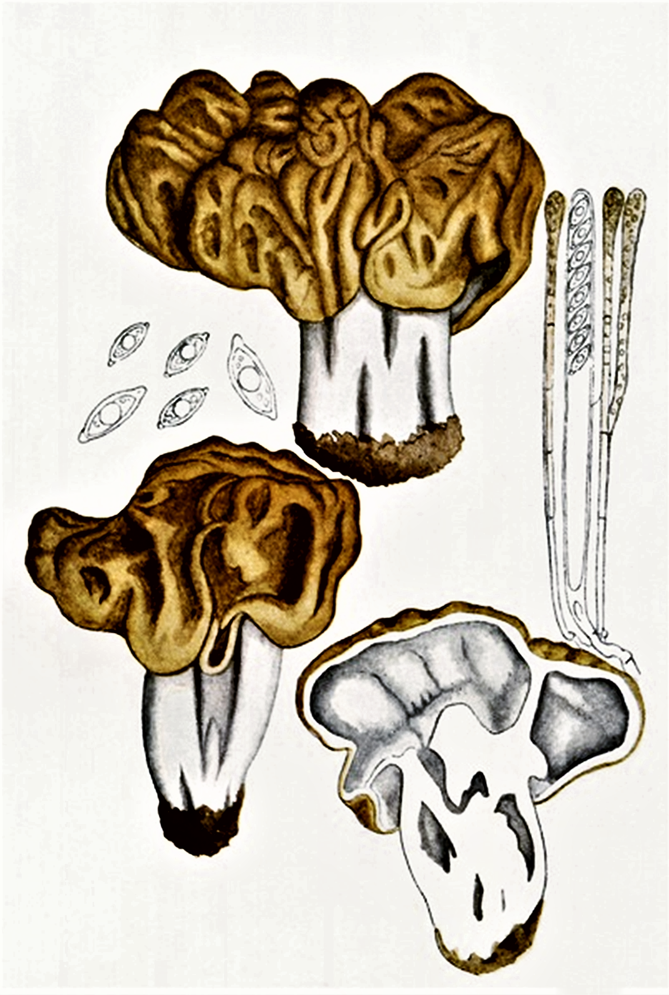 Giacomo Bresadola: Gyromitra gigas